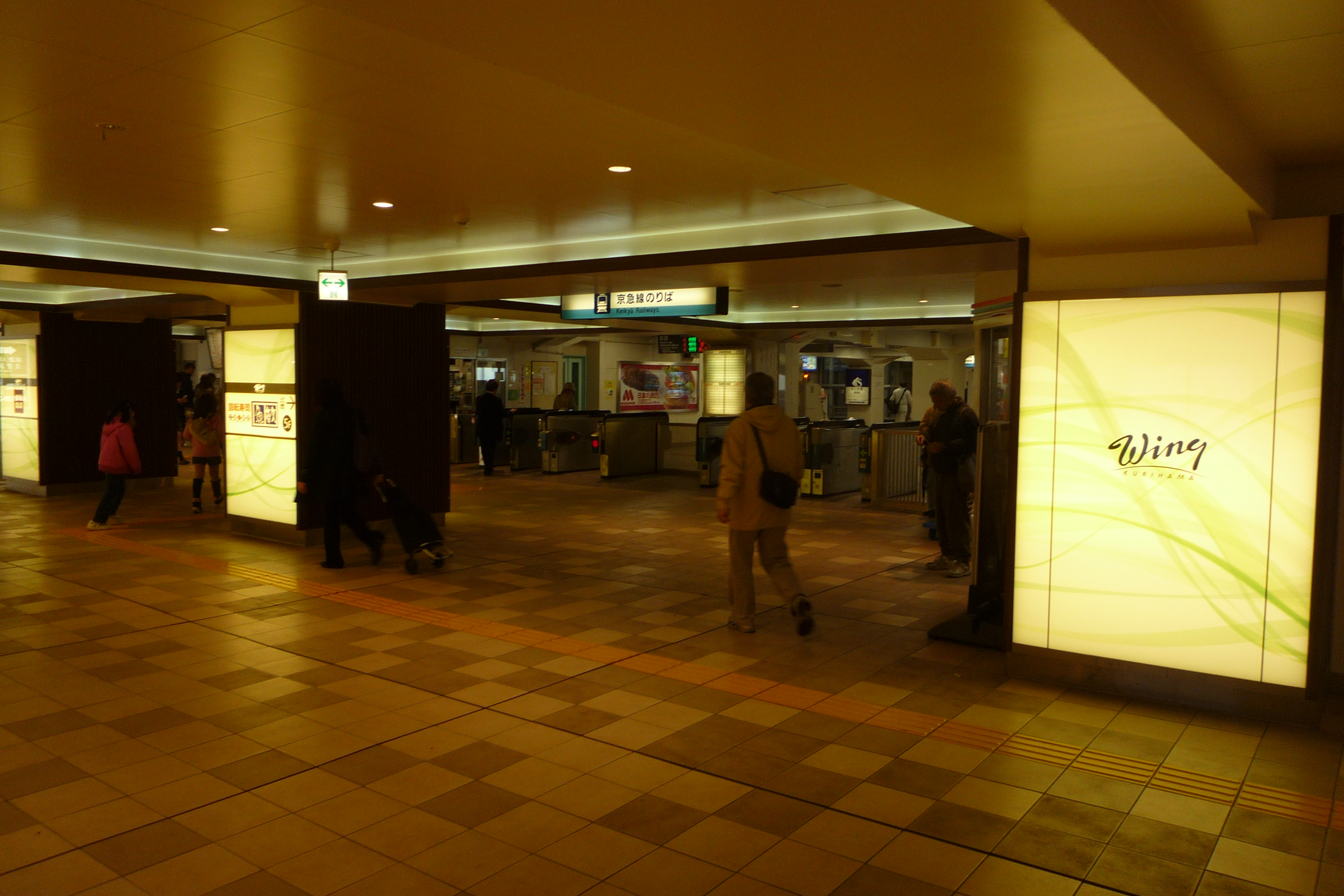 京急久里浜駅の改札